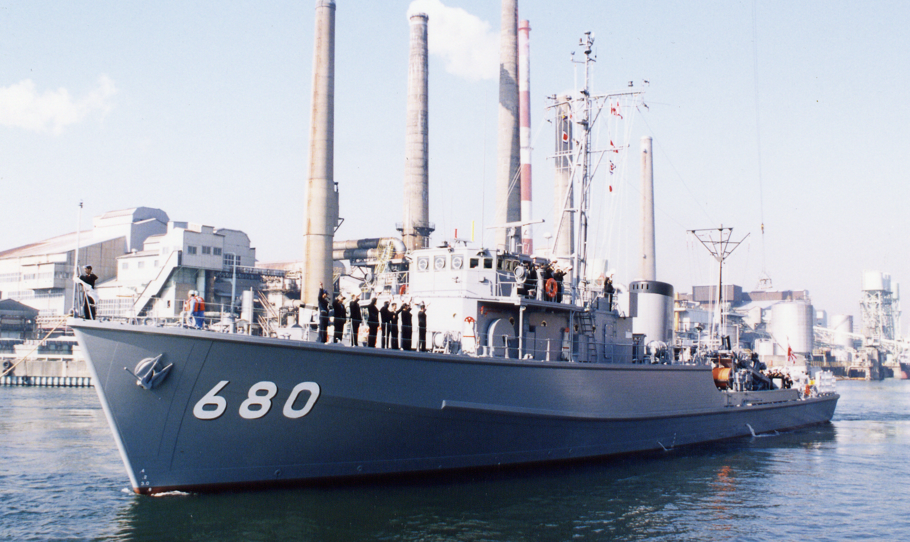 掃海艇ながしま